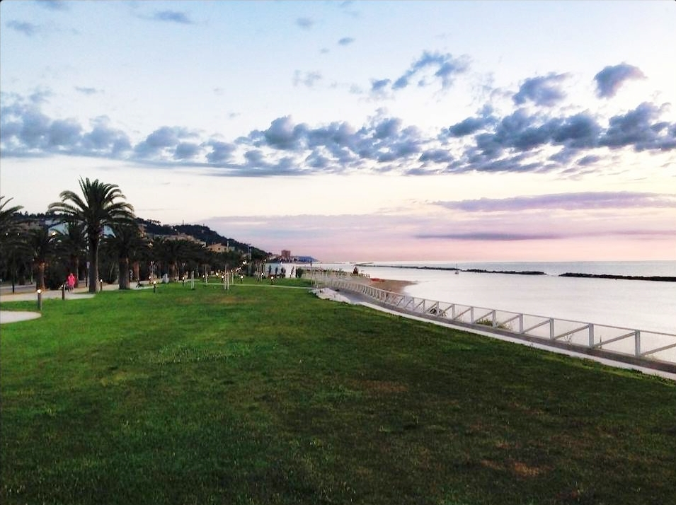 Riqualificazione del lungomare nord di Grottammare, offre ampi spazi verdi, sedute in legno, panorama a strapiombo sul mare e ottima fruibilità.